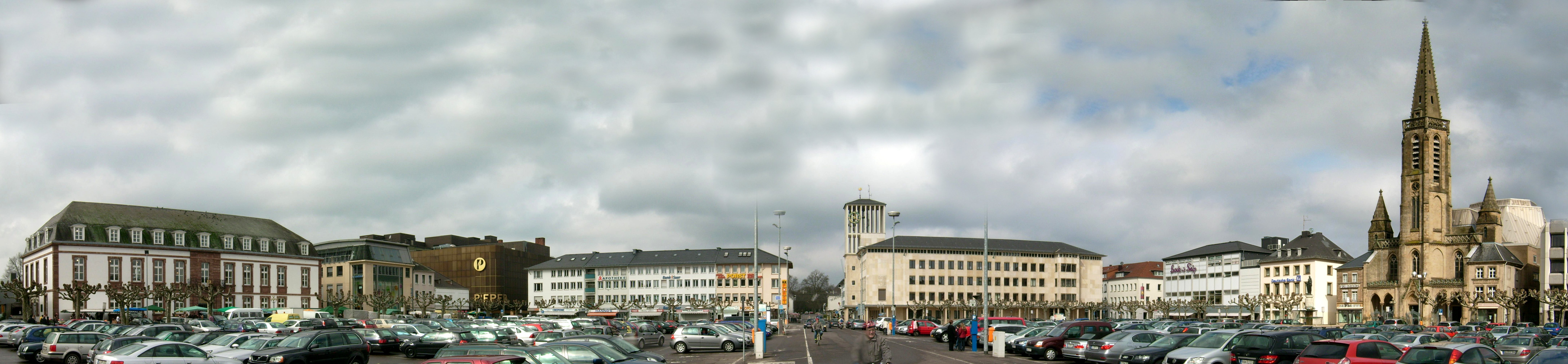 Bildbeschreibung: Marktplatz Saarlouis